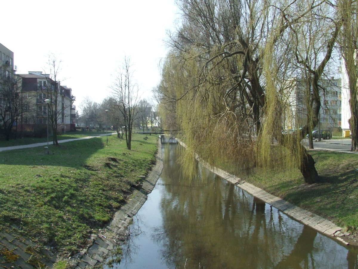 Mińsk Mazowiecki, rzeka Srebrna